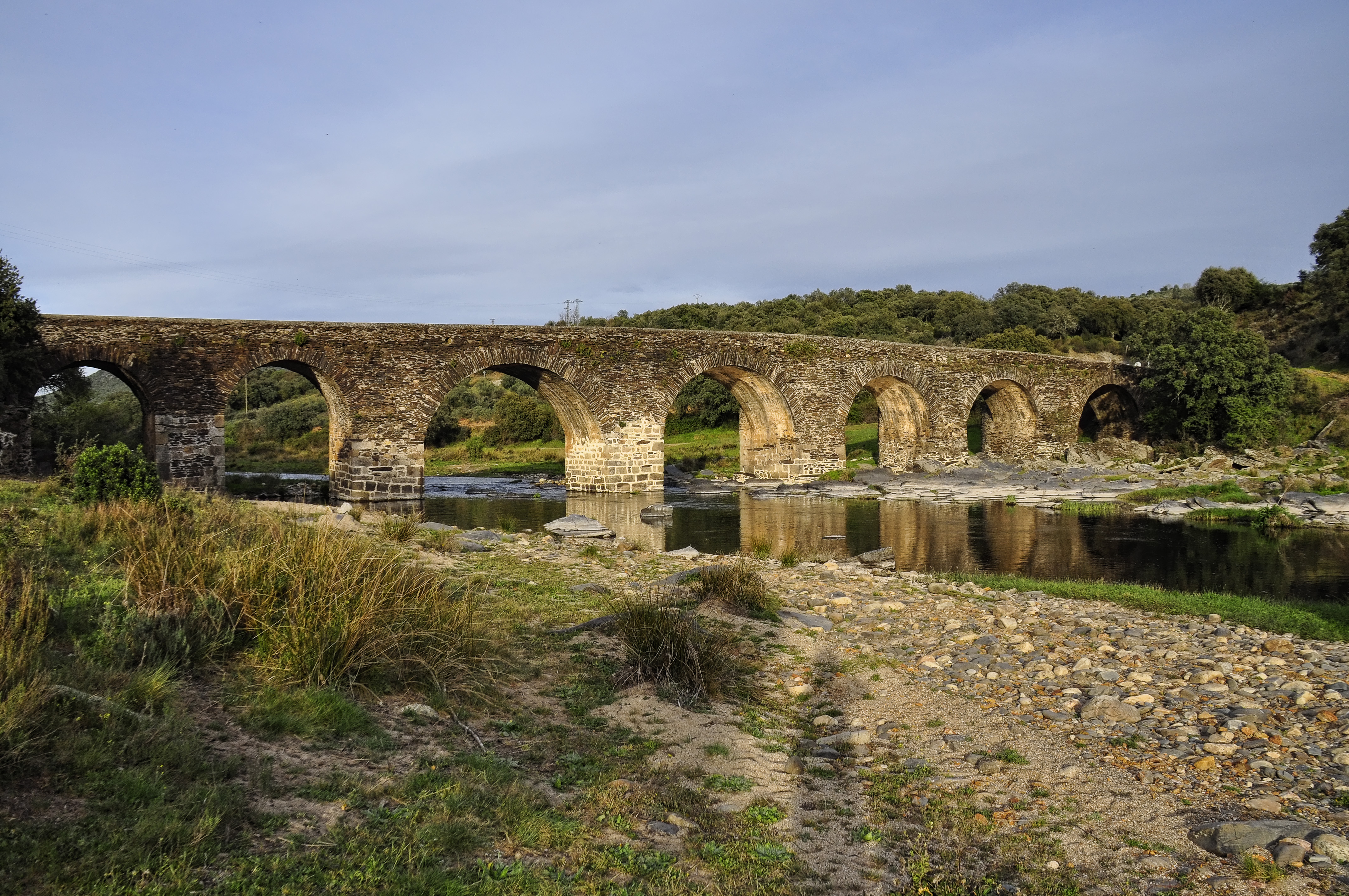 Sotoserrano, provincia de Salamanca, Castilla y León, España.